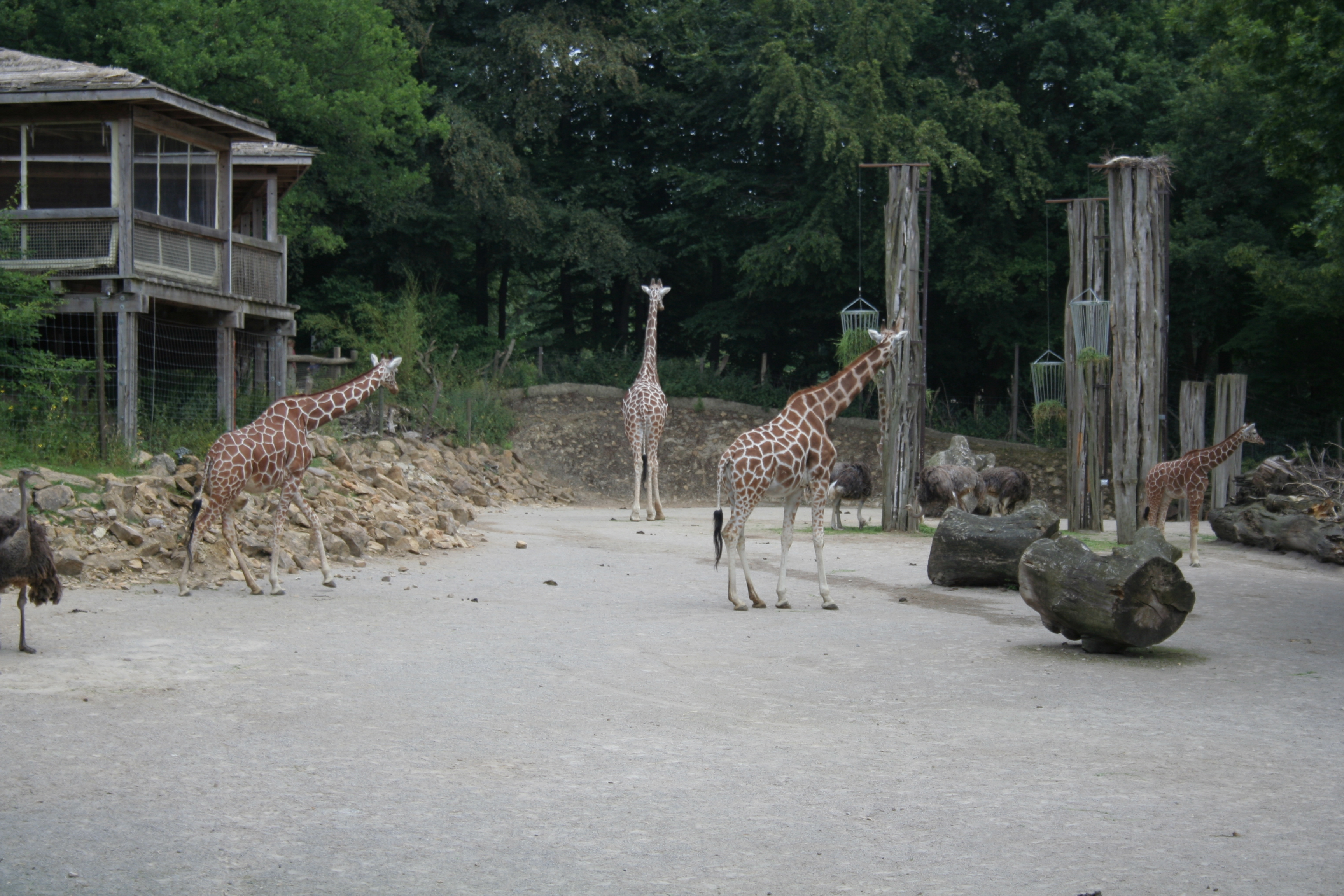 Osnabrücker Zoo. Giraffen